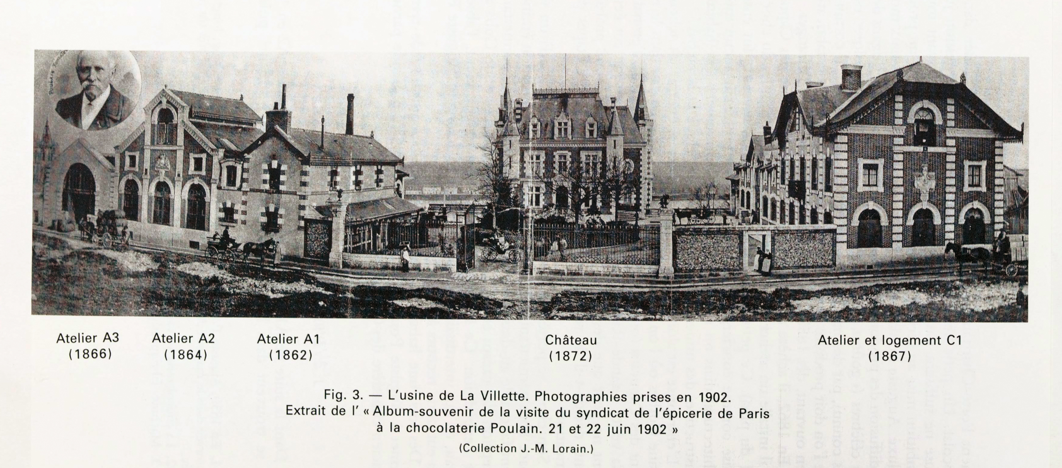 Photo extraite de l'Album-souvenir de la visite du syndicat de l'épicerie de Paris à la chocolaterie Poulain, reproduite dans Mémoires de la Société des sciences et lettres de Loir-et-Cher.